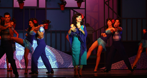 Vanessa Silva na peça "Vai de Em@il a Pior"